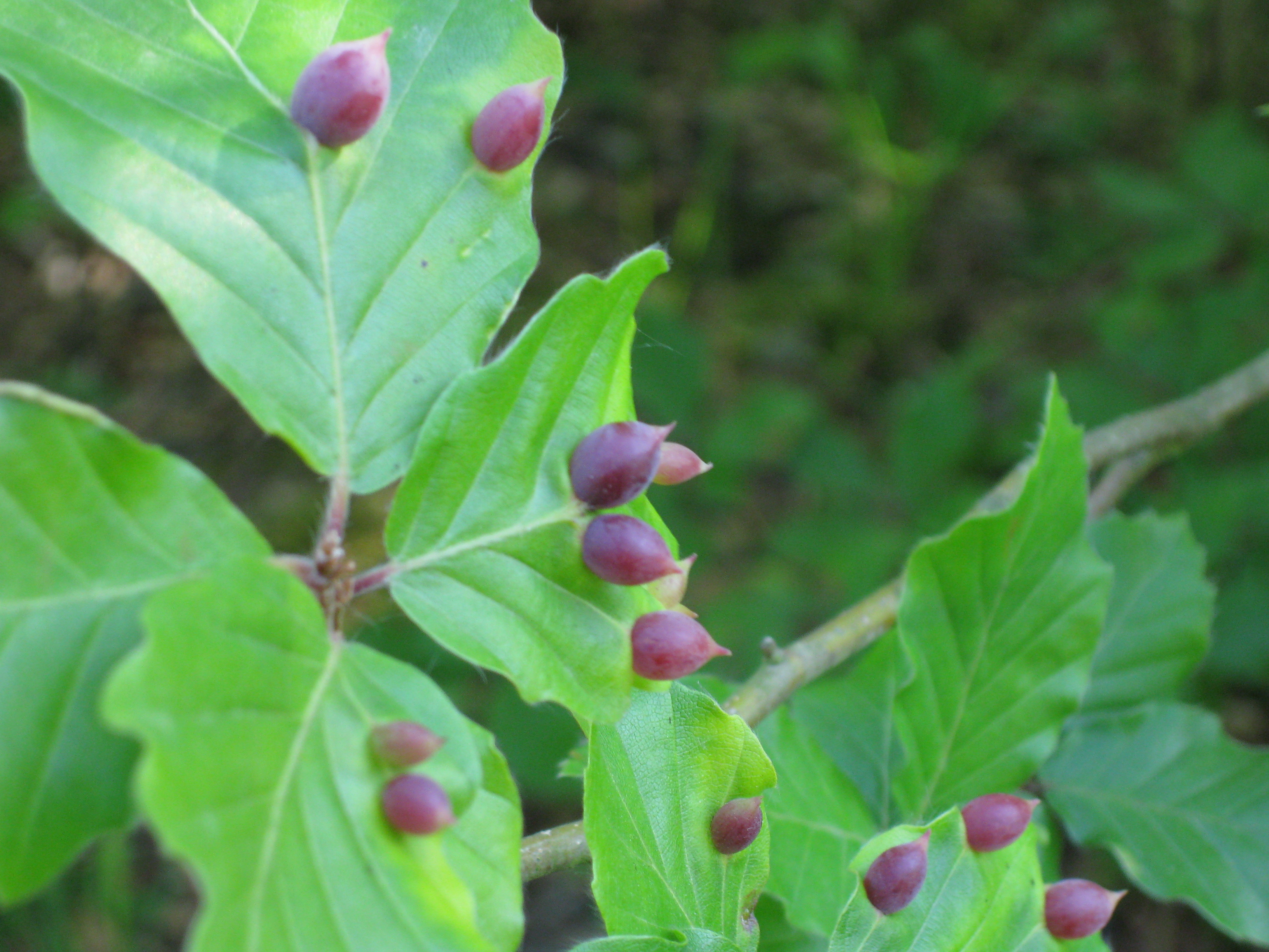 eigenes Foto